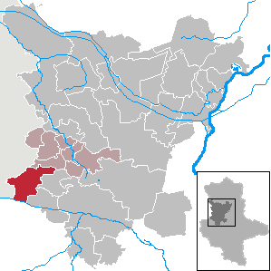 Hötensleben in Saxony-Anhalt (Country) - District (Landkreis) Börde